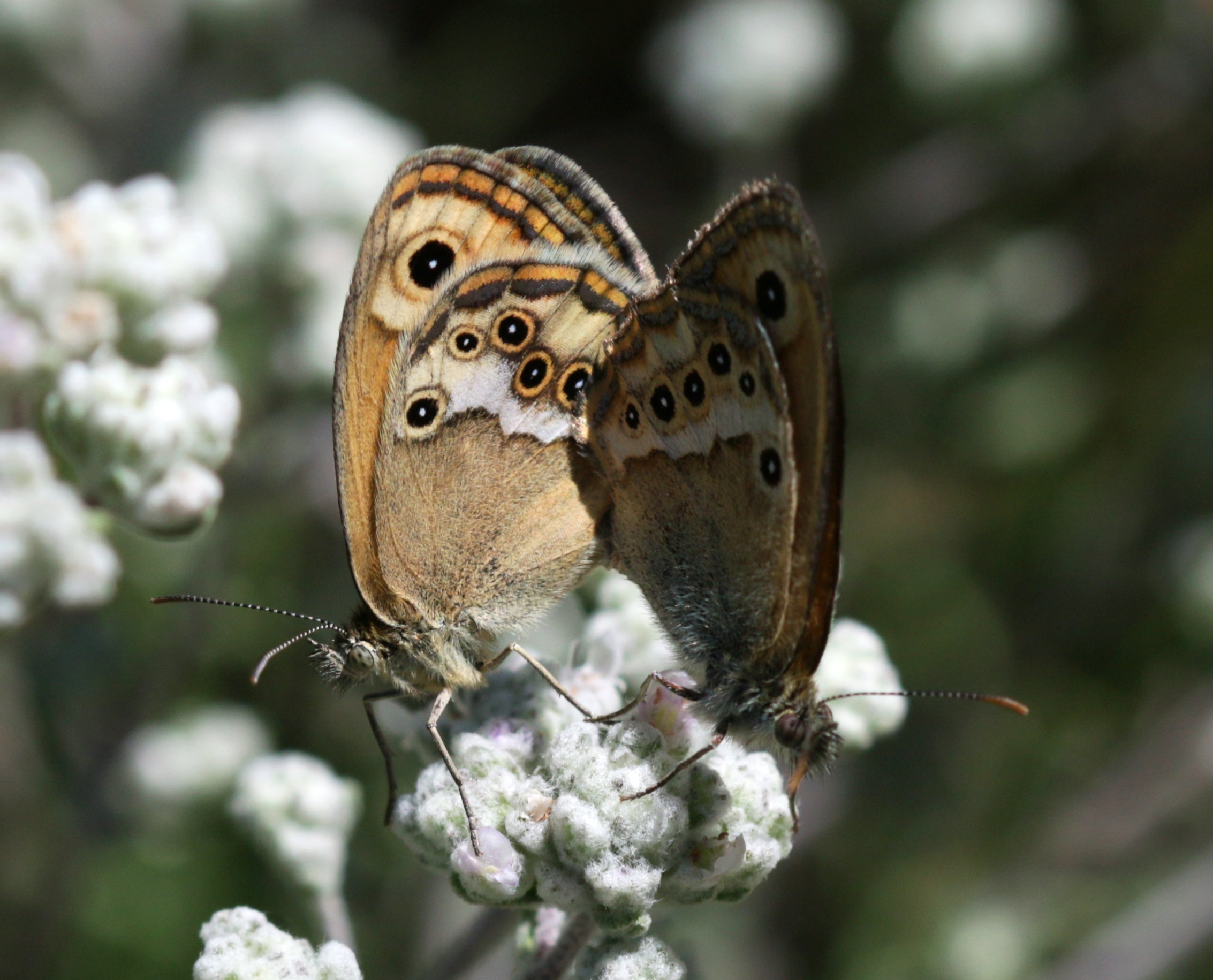 Tosos, Aragon, Spain